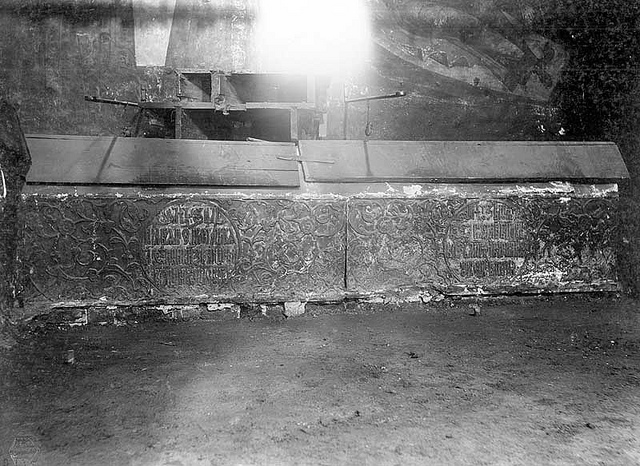 Вид на боковые стороны надгробий кн. Андрея Владимировича Радонежского (после 1372-1426) и Андрея Васильевича Углицкого (1446-ок.1494). Надгробия расположены у северной стены. Фотография К.А.Фишера. 1905 г. Из коллекций Музея архитектуры им. А.В.Щусева. Инв. номер КПоф 4866-30, 31.